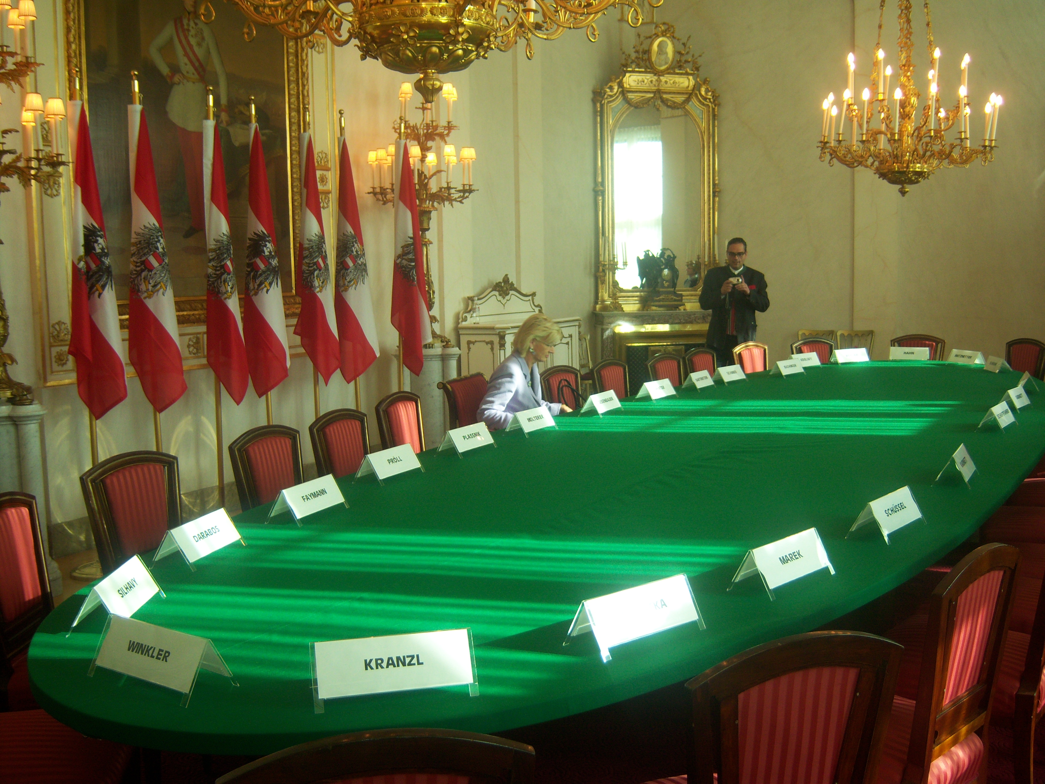 Ministerrat Sitzungssaal im Bundeskanzleramt, Wien (Österreich) Meeting room of the Cabinet, Federal Chancellery, Vienna (Austria)